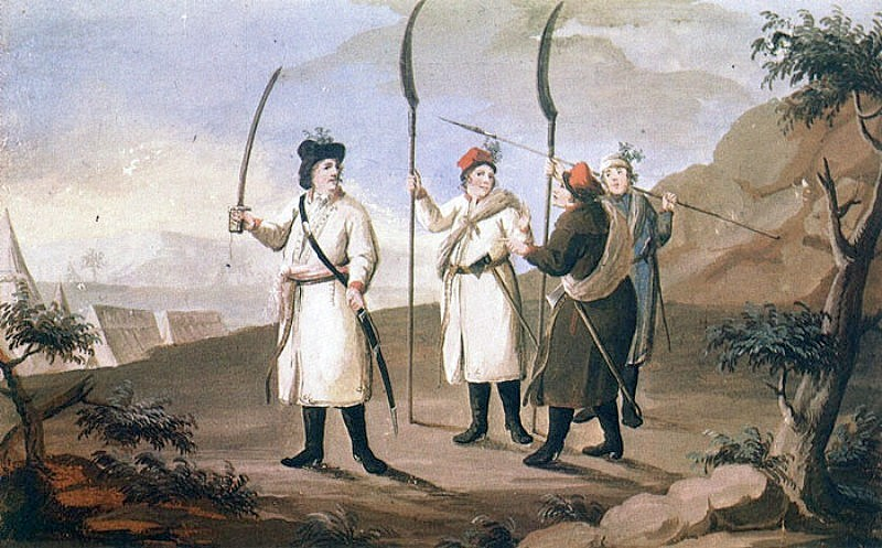 Kosynierzy chłopskiego pospolitego ruszenia z 1794 roku. Obraz.